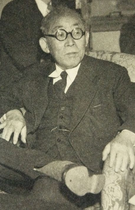 清瀬一郎